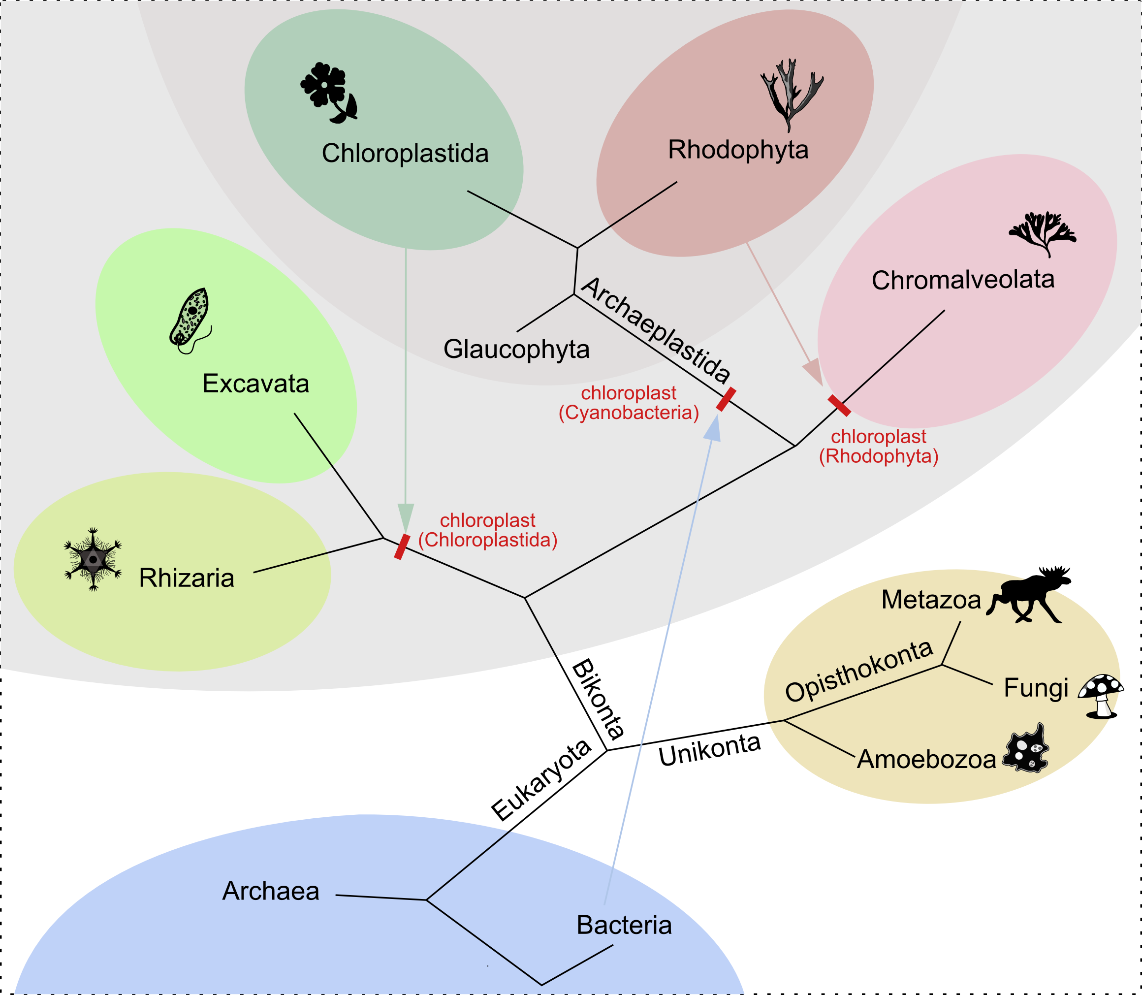 Kladogram organizmów żywych, ze wskazaniem transmisji plastydów między liniami ewolucyjnymi